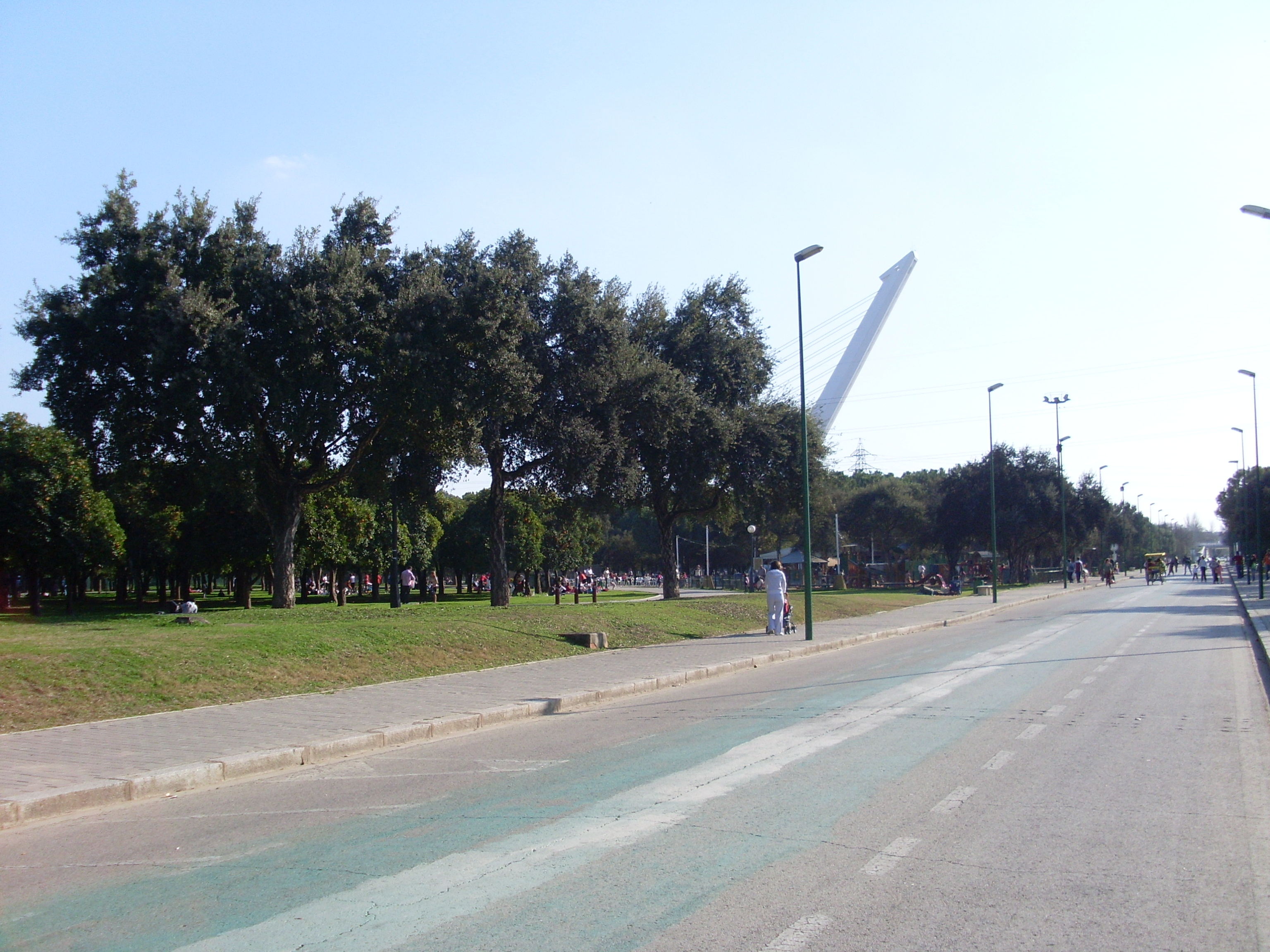 Vista del Parque del Alamillo en invierno.